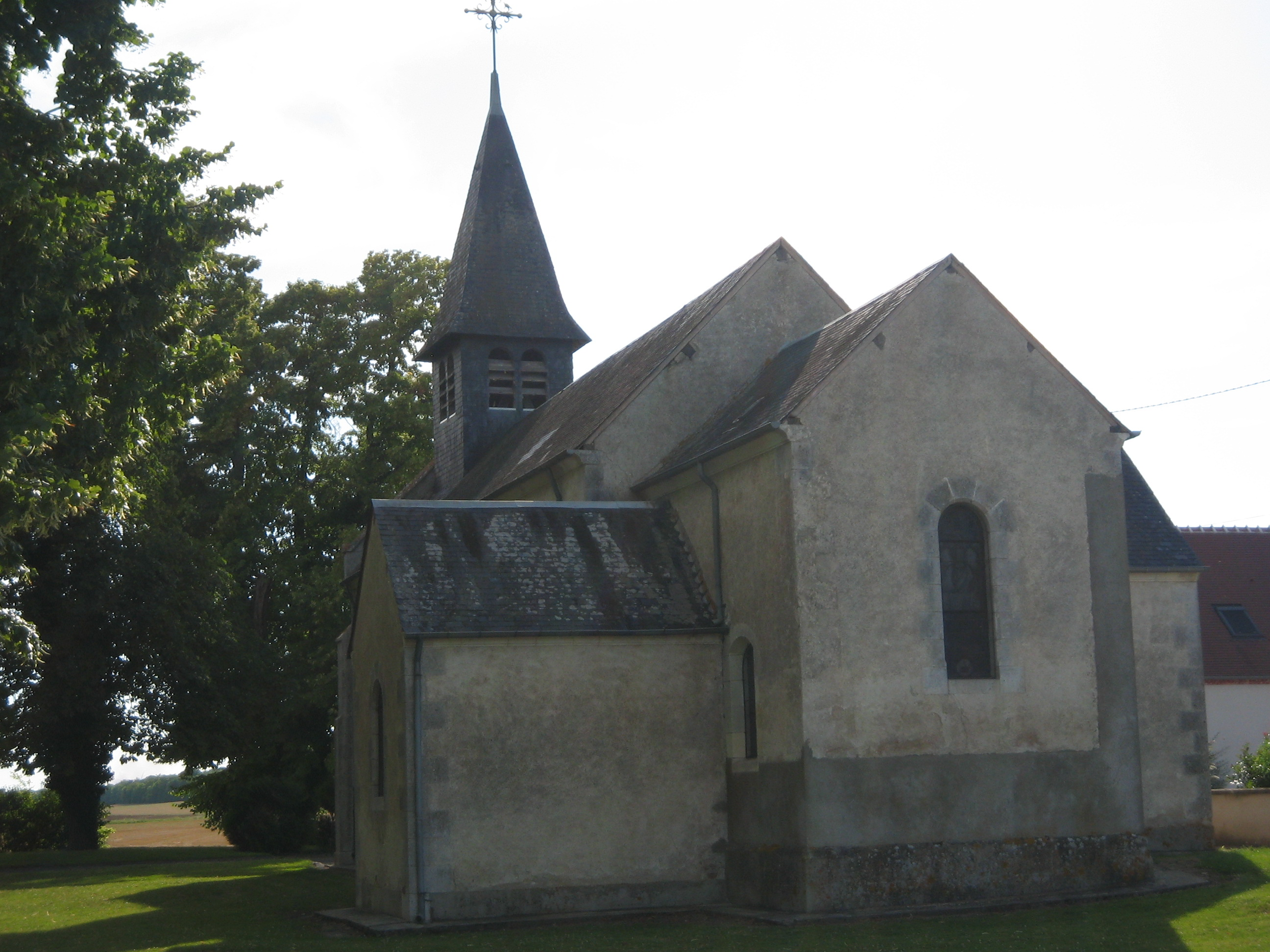 Eglise Saint Pierre, fin XIe et XVIe, Plou.